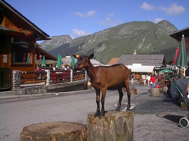 Les chèvres posent pour les photographes au hameau des Lindarets (commune de Montriond), arriére la Pointe de la ChavachePhoto J.J.Roland (13.08.2002)